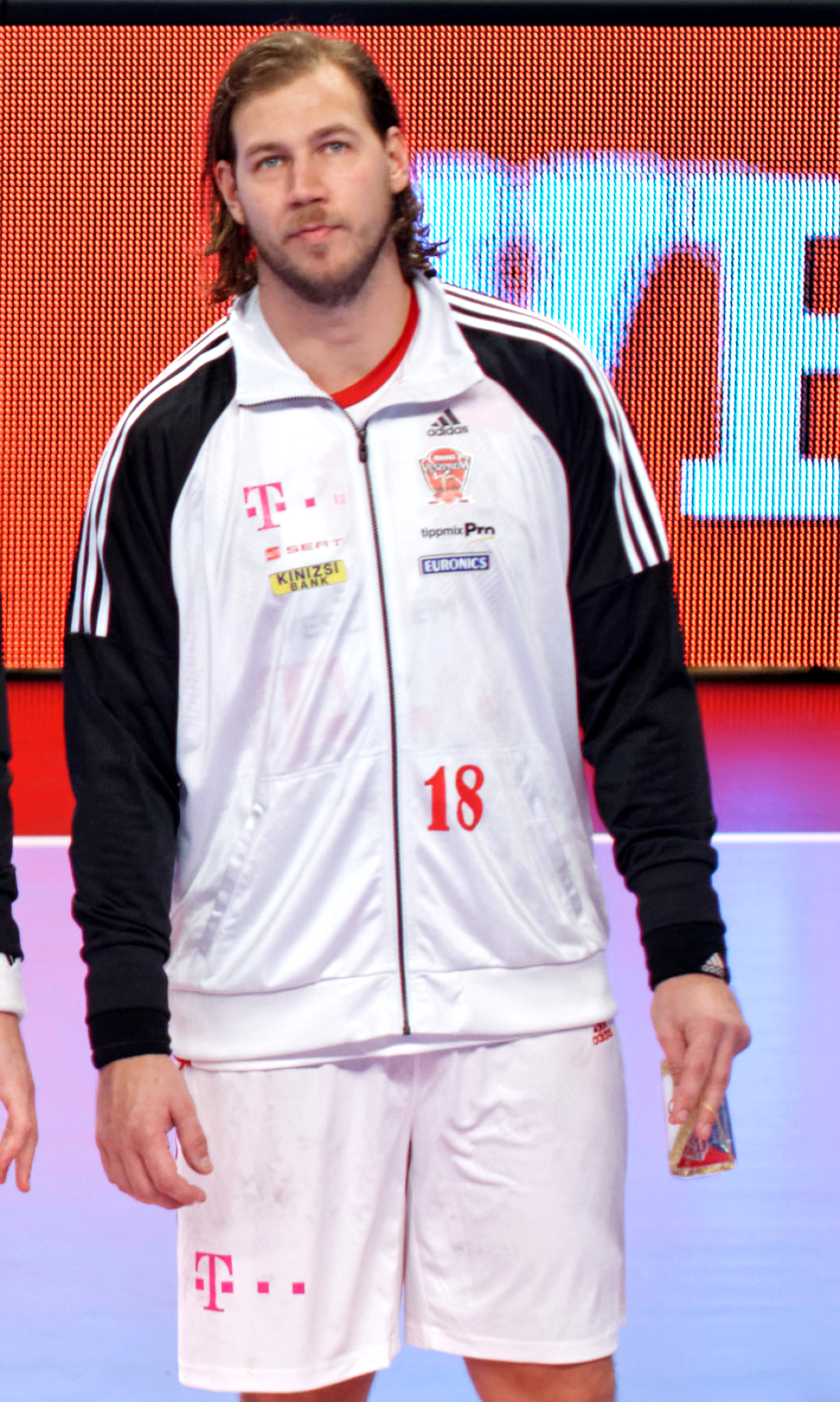 Rencontre de phase de groupe entre le PSG et Veszprem; A Coubertin, le 27 novembre 2016.